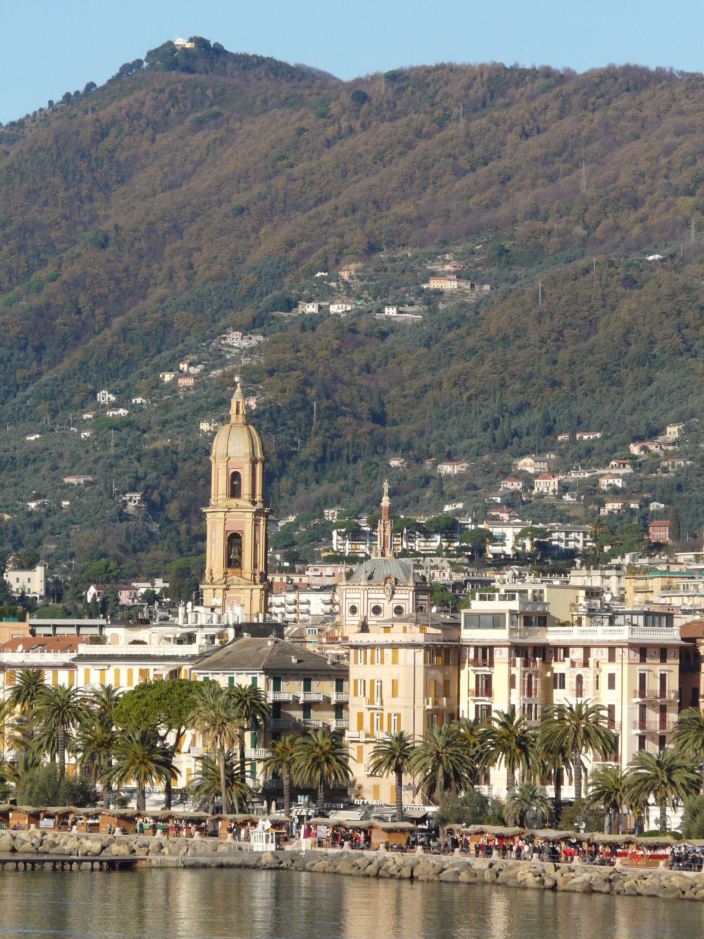 Scorcio del lungomare di Rapallo, Liguria, Italia